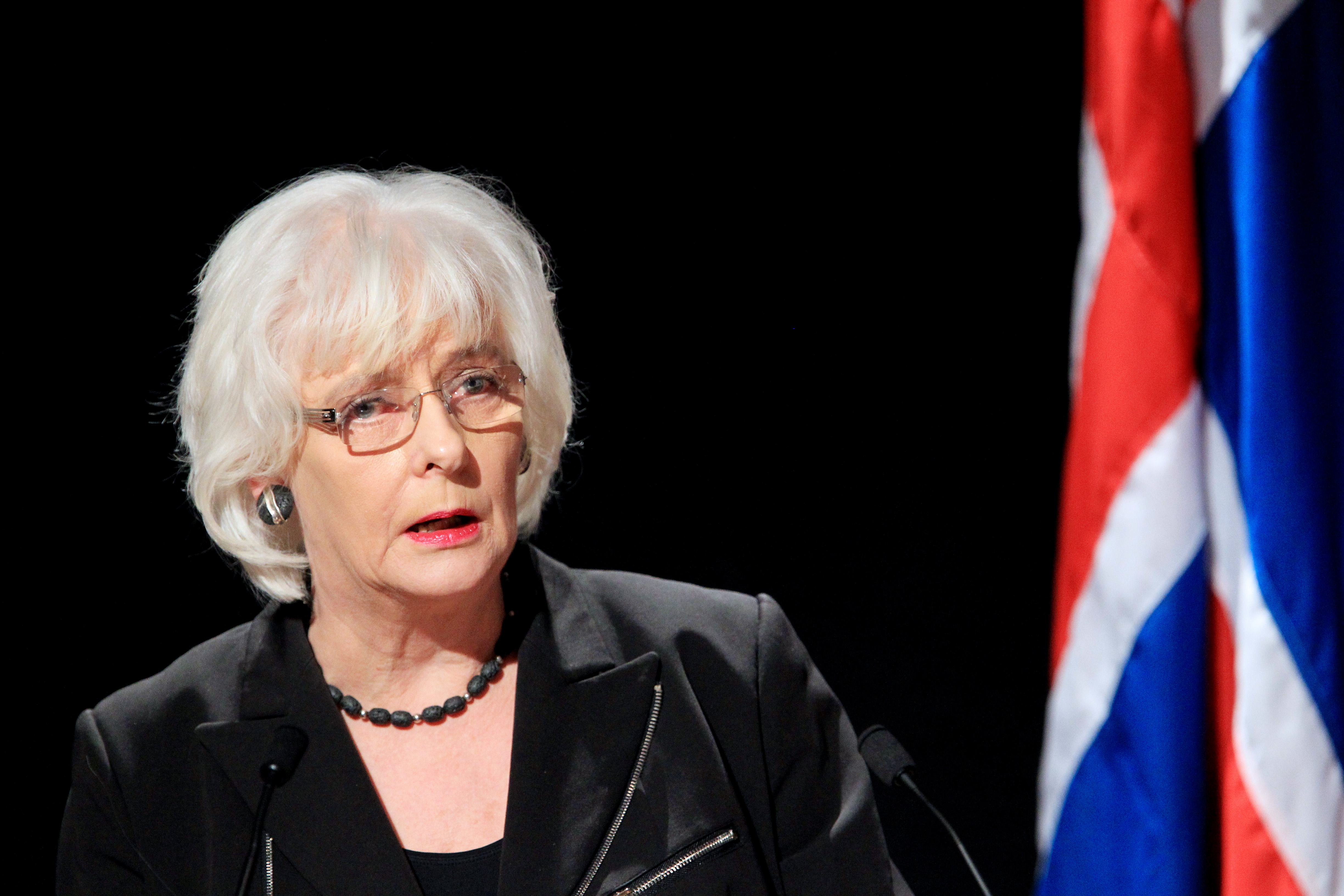 Islands statsminister Jóhanna Sigurðardóttir talar vid Nordiska rådets session 2010